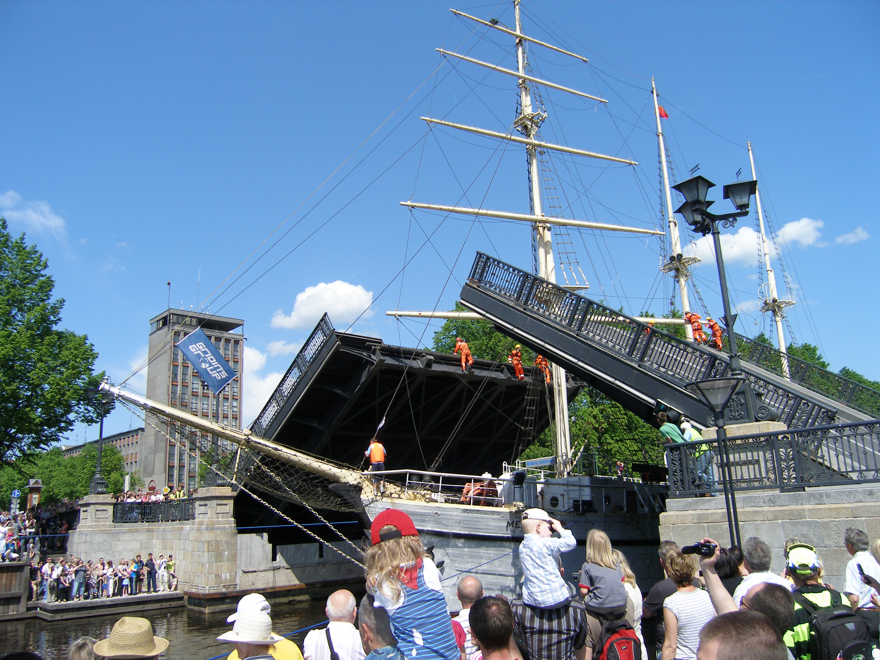 Brižos tiltas, Klaipėda